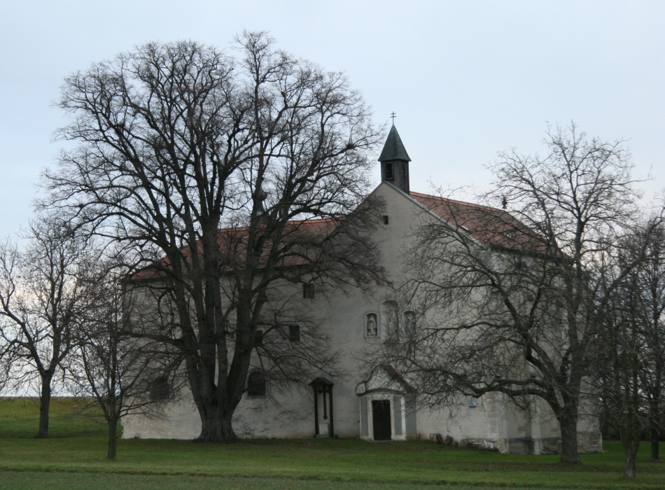 Winterlinde vor dem Paulinerkloster (auch "Ödes Kloster") in Baumgarten. This media shows the natural monument in the Burgenland with the ID MA-011.